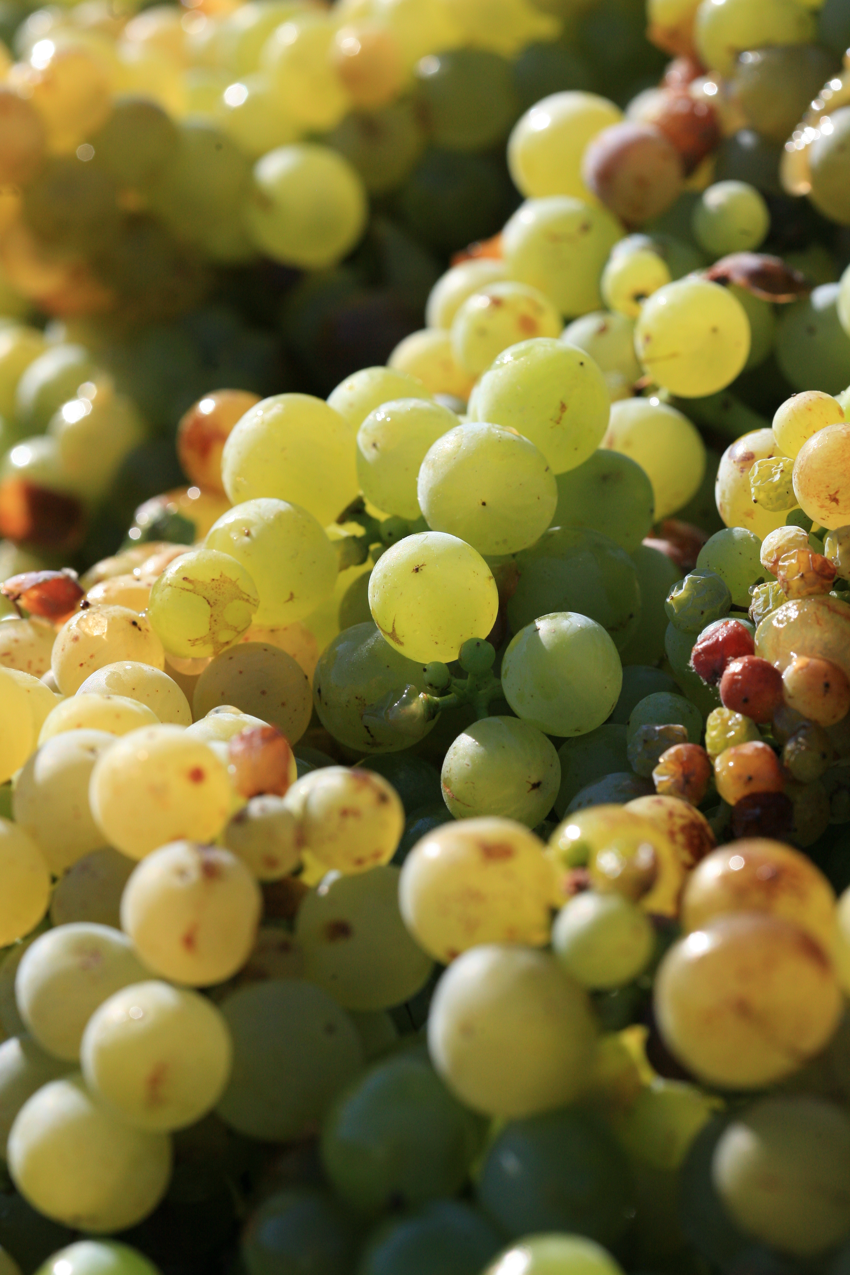 Muscat - secteur de Beaumes-de-Venise, Vaucluse, France